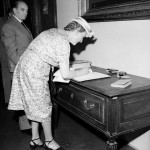 Roma La vedova di Marconi firma il registro degli ospiti all'inaugurazione del Museo PT (PTI-F-003445-0000)